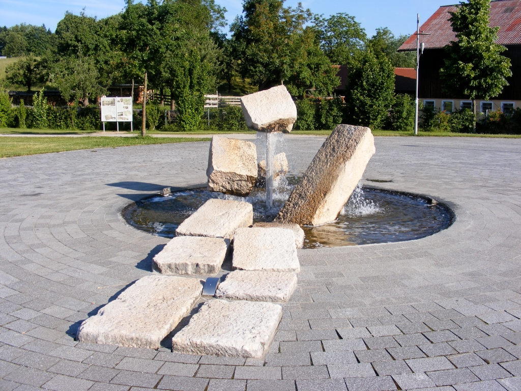 Brunnen am Tunnelspielplatz in Salzburg-Liefering. Im HIntergrund eine Tafel des Lieferinger Kulturwanderwegs.